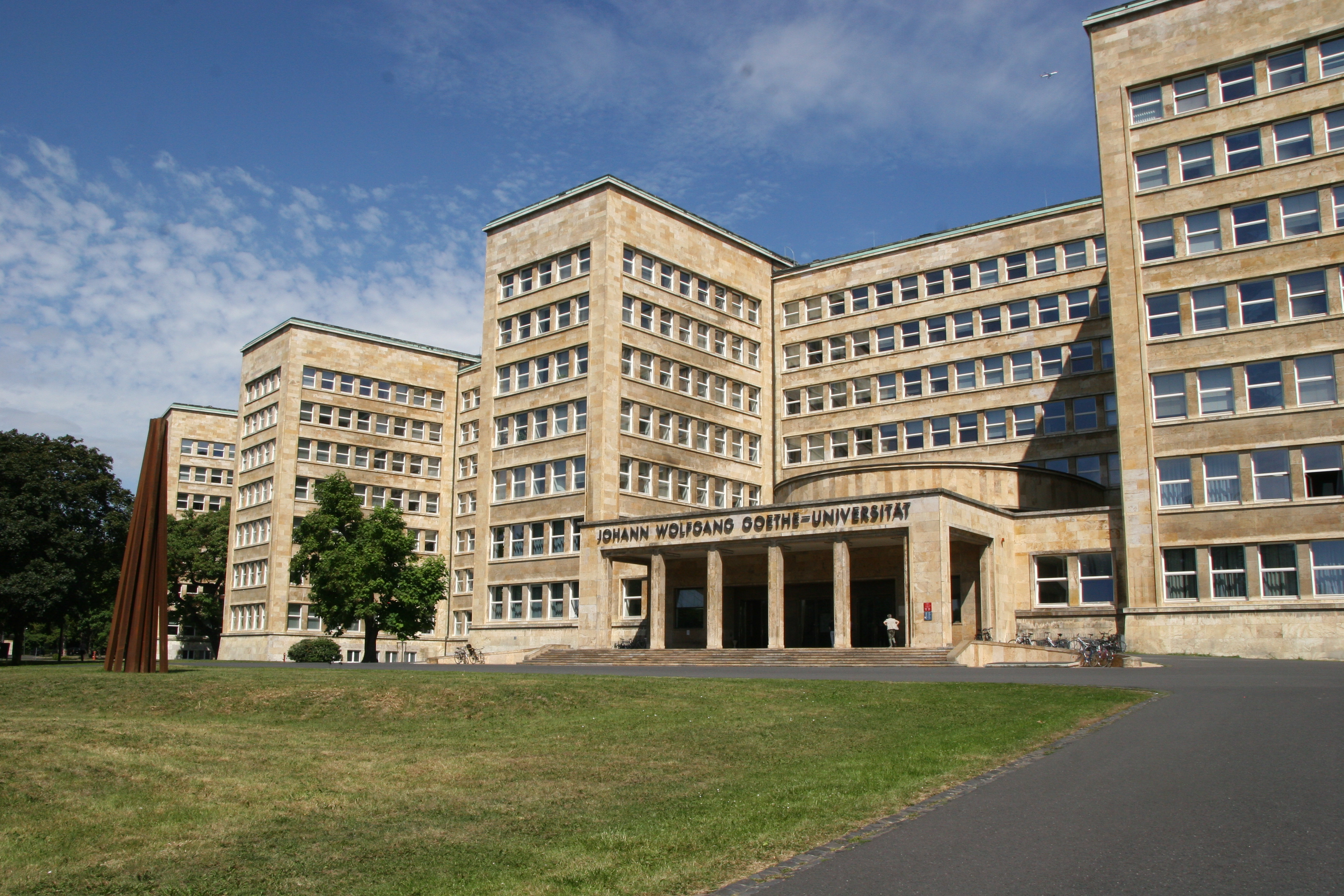 Haupteingang des IG-Farben-Hauses/Pölzig-Baus der J.W.Goethe Universität Frankfurt am Main. Die Stahlskulptur am linken Bildrand ist Teil der "Blickachsen" Ausstellung.